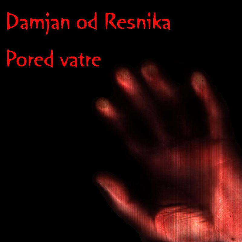 Srpskohrvatski / српскохрватски: Omot prvog studijskog albuma Damjana od Resnika "Pored vatre" iz 2011. godine.